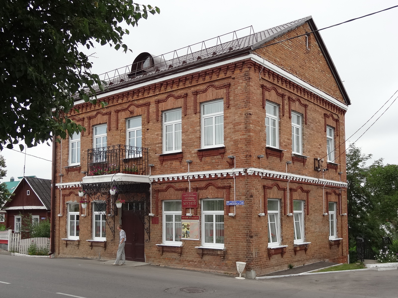 музей гісторыі і этнаграфіі Глыбоцкага краю